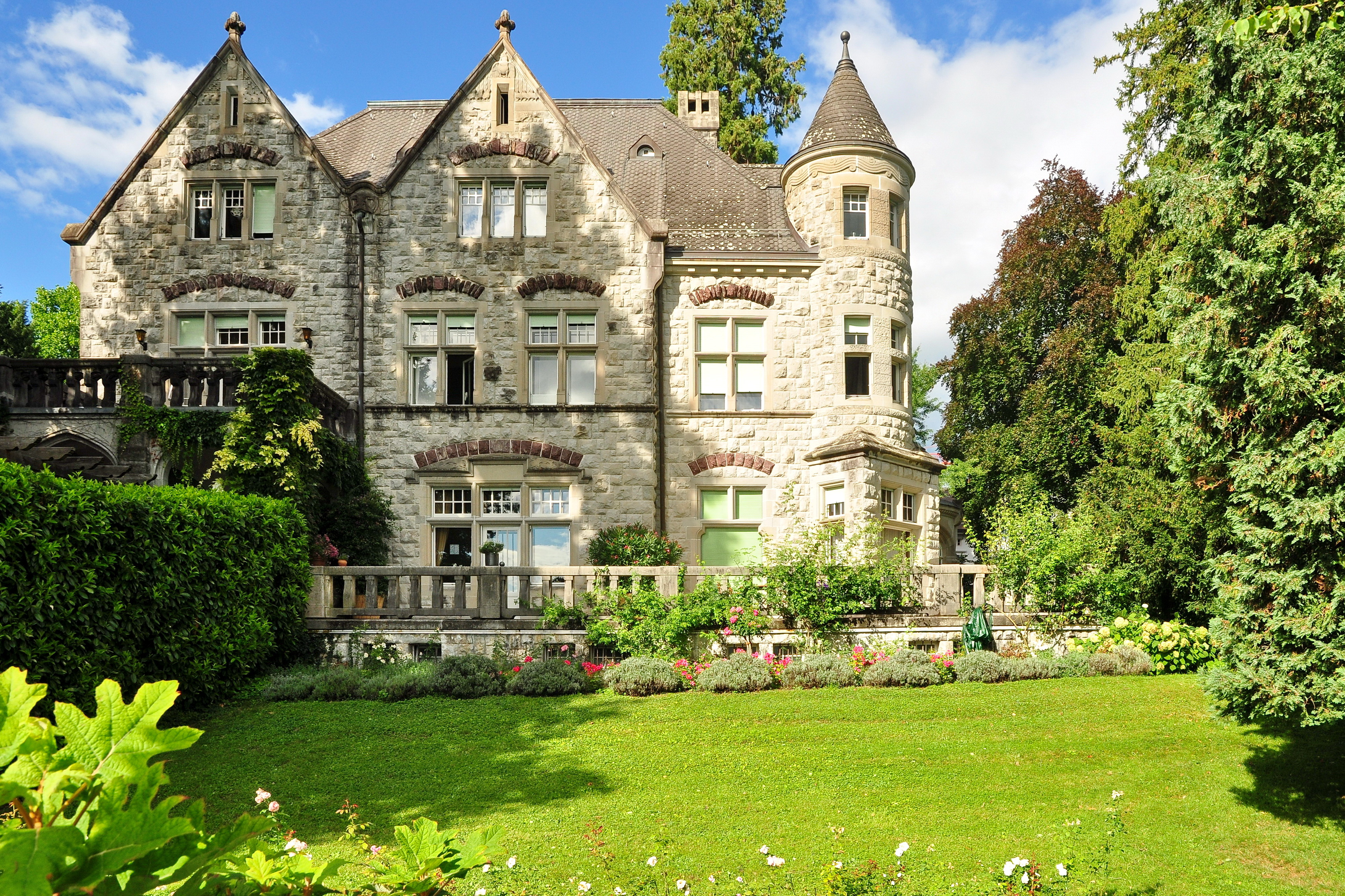 Villa Alma mit Nebenbauten, Seestrasse 80 in Männedorf (Switzerland)